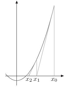 牛顿迭代法的图，由ganzhi采用metapost绘制